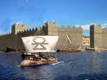 Ricostruzione ideale dell'ingresso del cothon di Mozia.